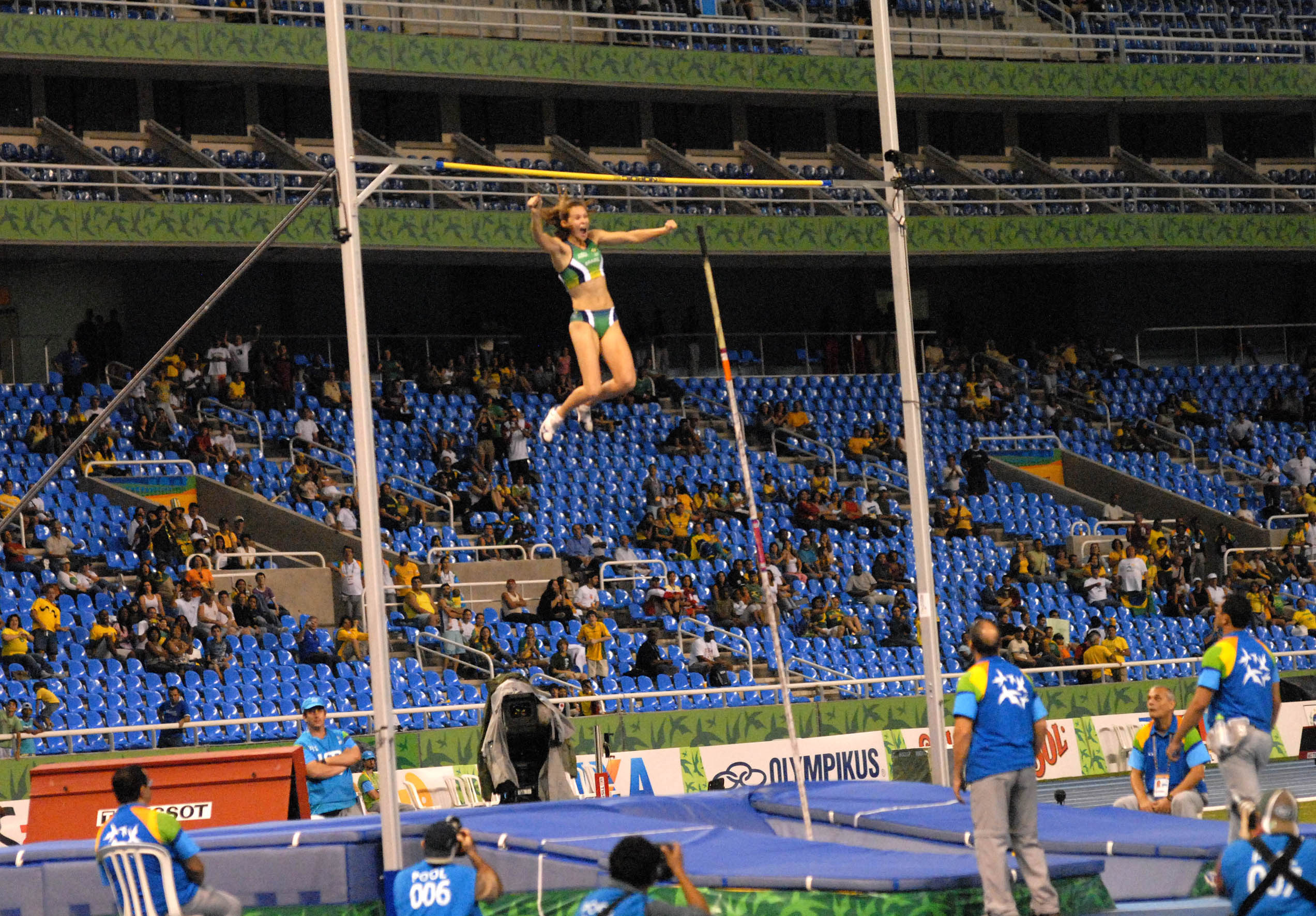 Rio de Janeiro - A paulista Fabiana Murer conquistou a medalha de ouro no salto com vara, ao elevar em 20 centrímetros o antigo recorde pan-americano de 4,40 metros